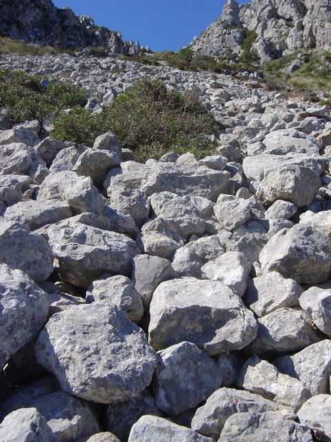 Rosseguera del Galatzó. Mallorca.